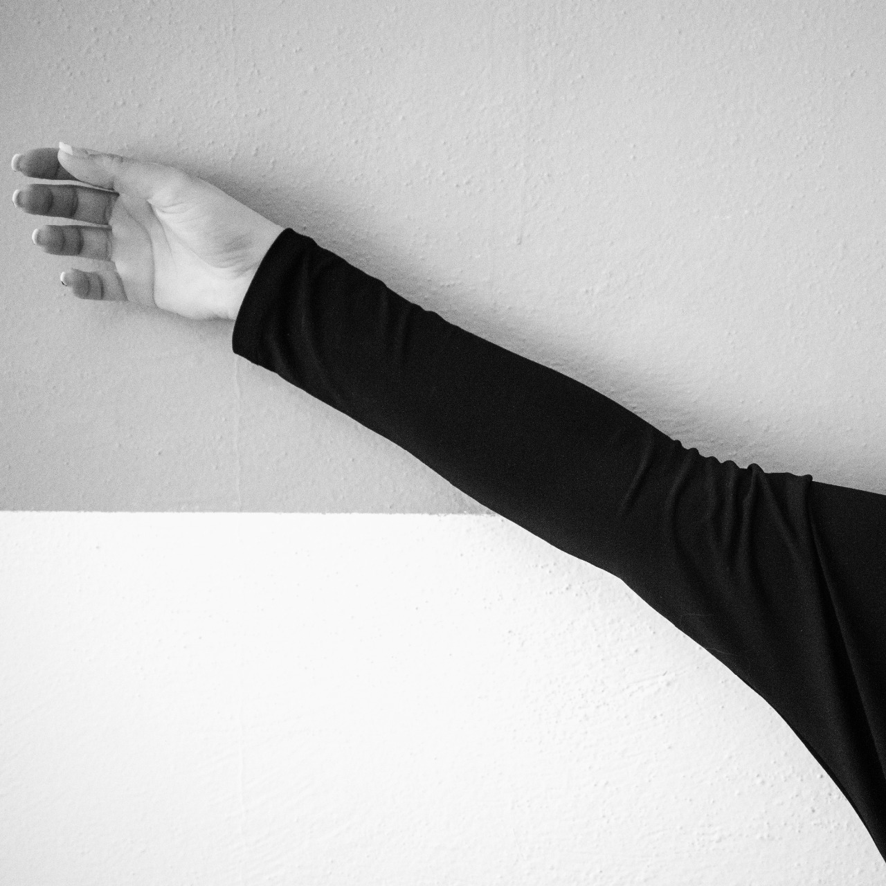 Fragmenty osobnosti